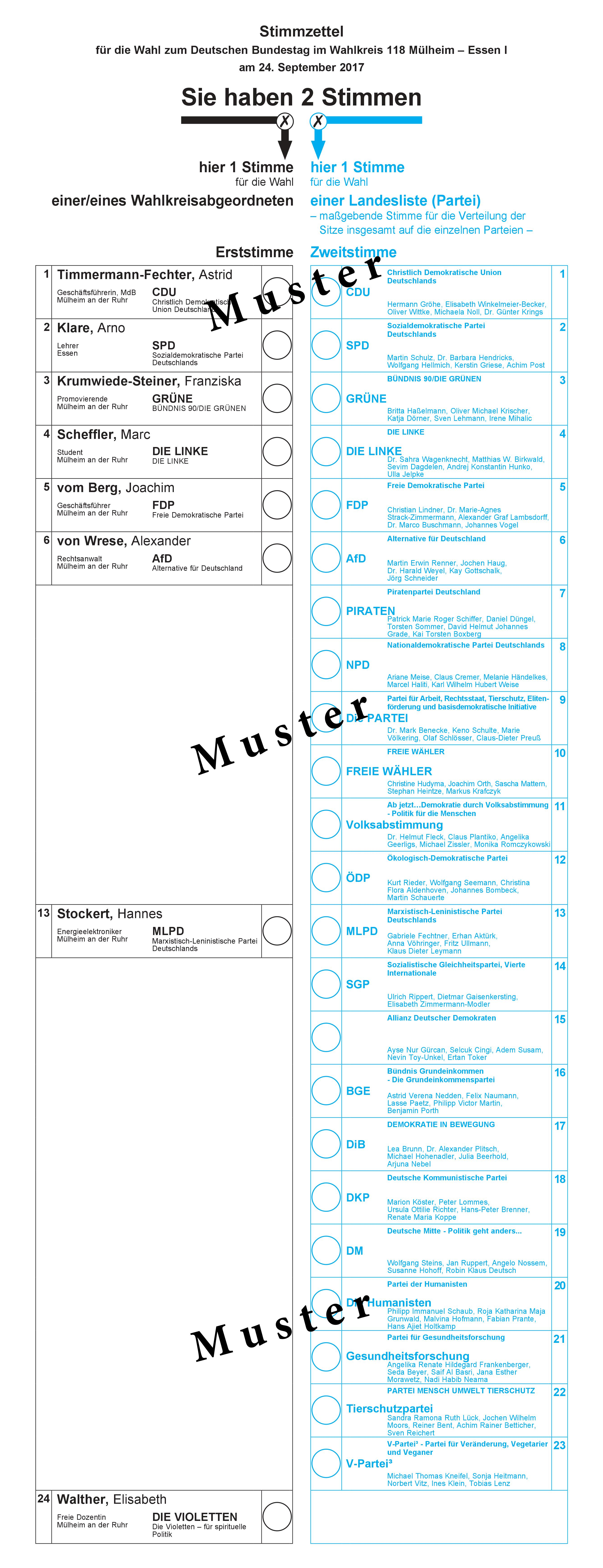 Amtliches Muster des Stimmzettel zur Bundestagswahl 2017 im Wahlkreis Mülheim - Essen I.